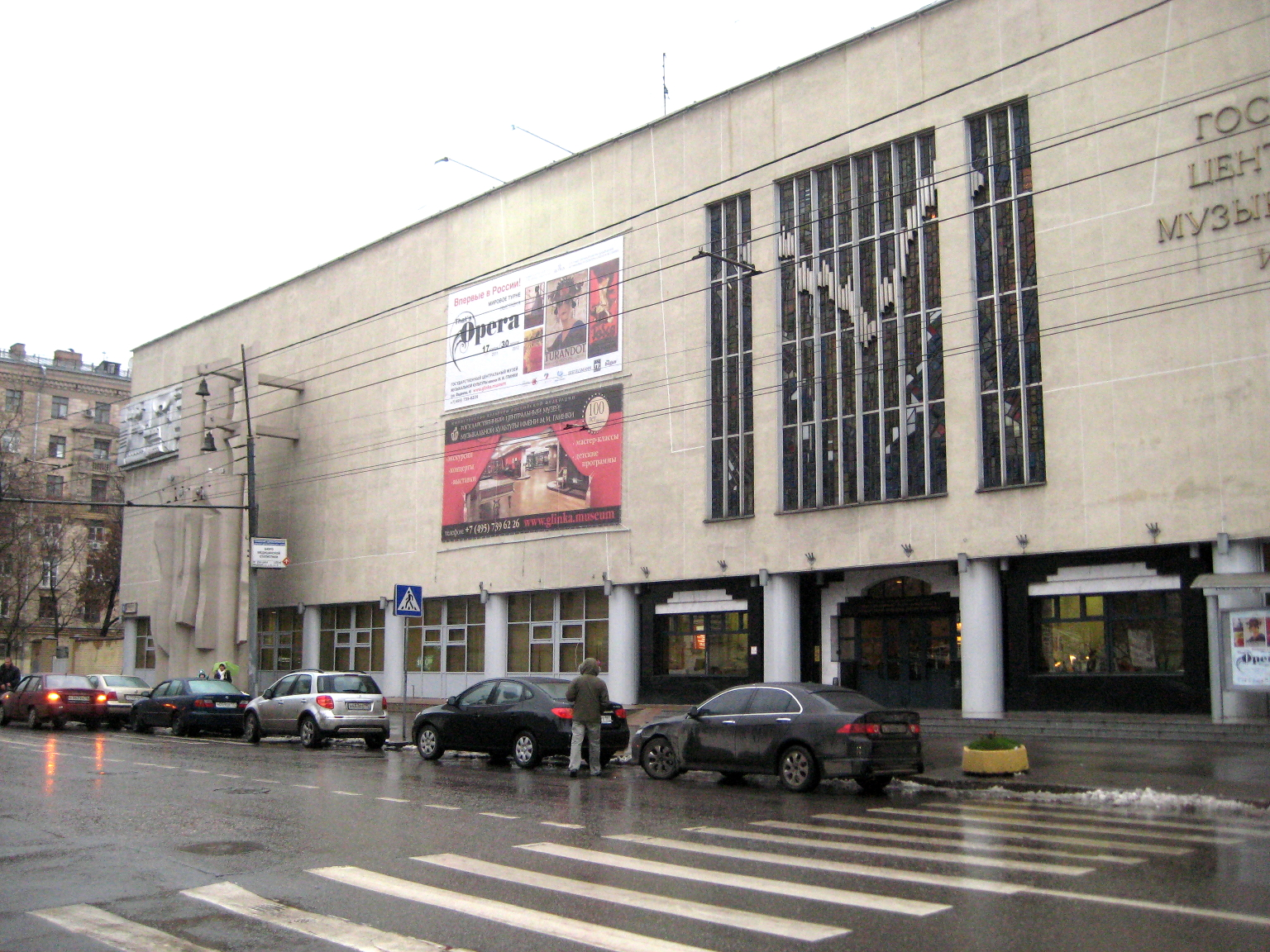 Государственный центральный музей музыкальной культуры им. М. И. Глинки